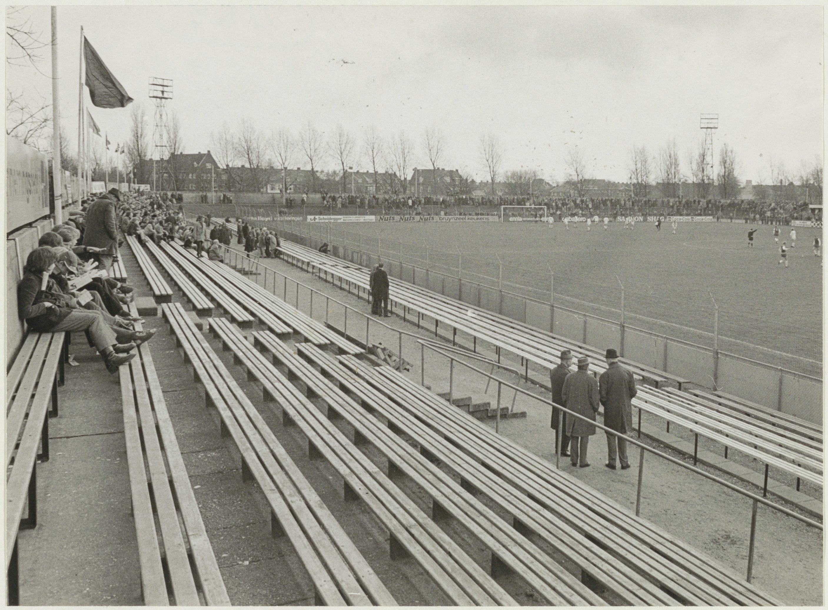 CollectieCollectie Fotoburo de BoerInventarisnummerNL-HlmNHA_54024745BeschrijvingBezoekers kijken vanaf de tribune naar de wedstrijd Haarlem - M.V.V. (3-2) tijdens het voetbalseizoen 1972/1973.FotonummerNL-HlmNHA_1478_5819DocumenttypeHistorieprenten, tekeningen en foto'sVervaardigerBoer, Cees de (1918-1985) Soort vervaardigerFotograaf Naam objectH.F.C. HaarlemAnnotatiesD2-10LandNederland ProvincieNoord-Holland GemeenteHaarlem PlaatsSchoten StraatSportweg GeografischSinnevelt Begindatum1972Einddatum1972TechniekFoto TrefwoordenVoetbalclubs, Sportvelden